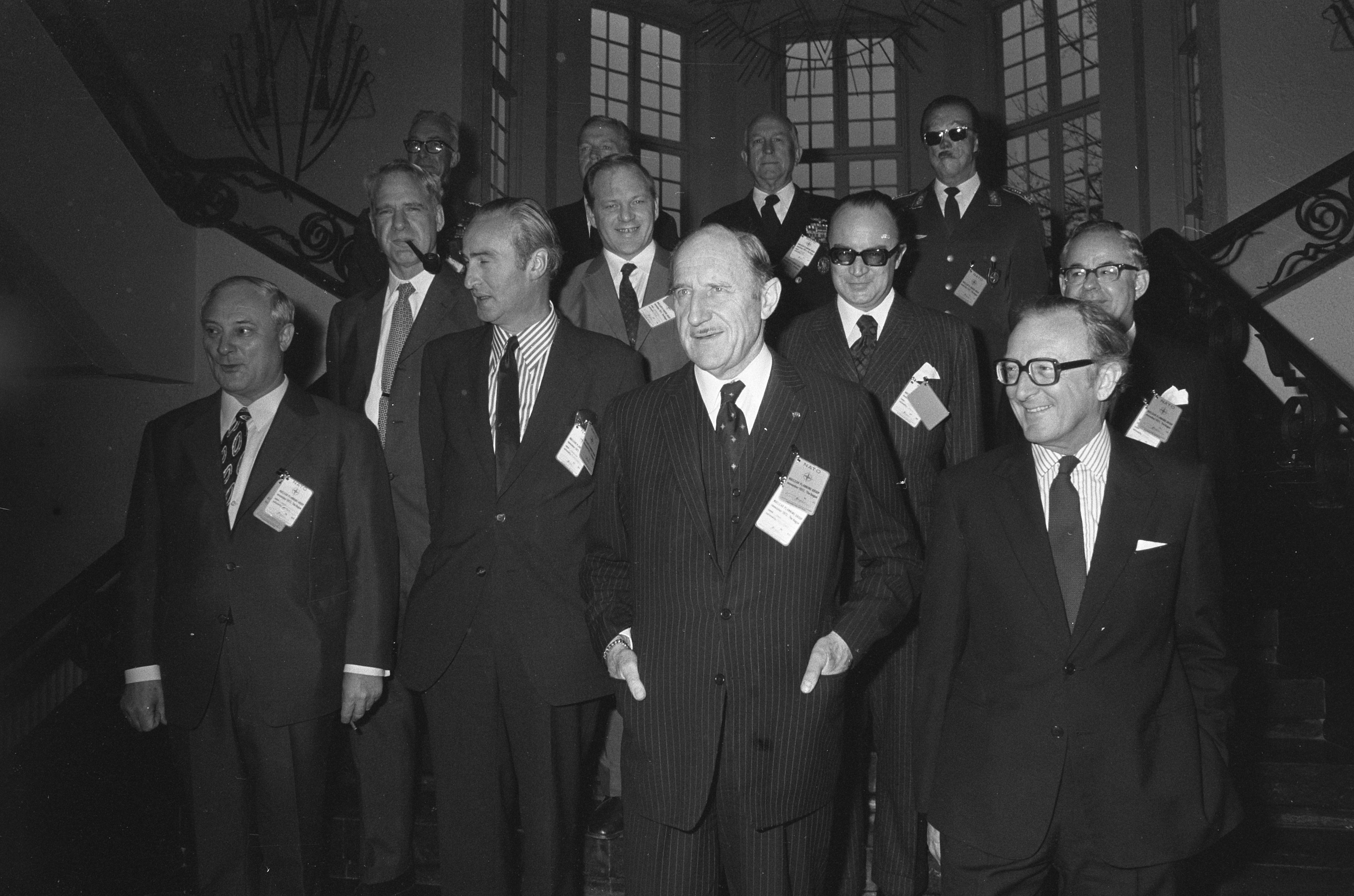 Collectie / Archief : Fotocollectie Anefo Reportage / Serie : Conferentie van de Nucleaire Planninggroep van de NAVO in Den Haag Beschrijving : Van links naar rechts de ministers van defensie G. Leber (West Duitsland), J. Schlesinger (VS), H. Vredeling en Secretaris-Generaal van de NAVO J. Luns Datum : 6 november 1973 Locatie : Den Haag, Zuid-Holland Trefwoorden : conferenties, kernwapens, ministers, secretarissen-generaal, verdragsorganisaties Persoonsnaam : Leber, Georg, Luns, J.A.M.H., Luns, Joseph, Schlesinger, John, Vredeling, Henk, Vredeling, Henk Fotograaf : Fotograaf Onbekend / Anefo Auteursrechthebbende : Nationaal Archief Materiaalsoort : Negatief (zwart/wit) Nummer archiefinventaris : bekijk toegang 2.24.01.05 Bestanddeelnummer : 926-8071